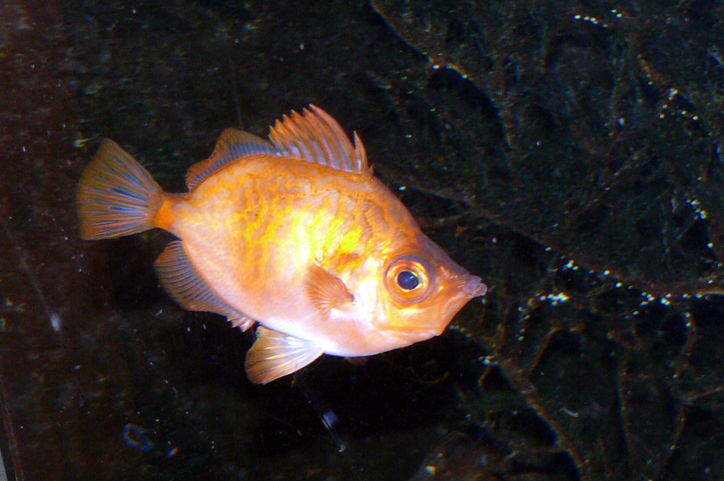 Eberfisch (Capros aper)